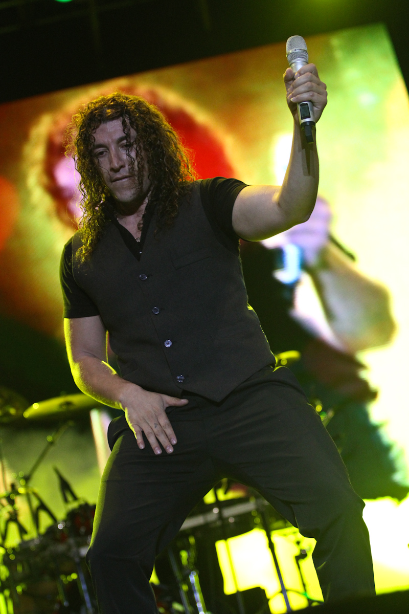 Tercera noche Festival Junto Al Mar Antofagasta 2012-18